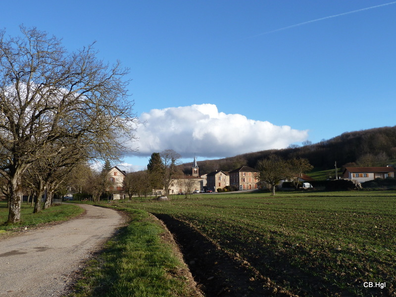 Photo prise depuis le Pré doré